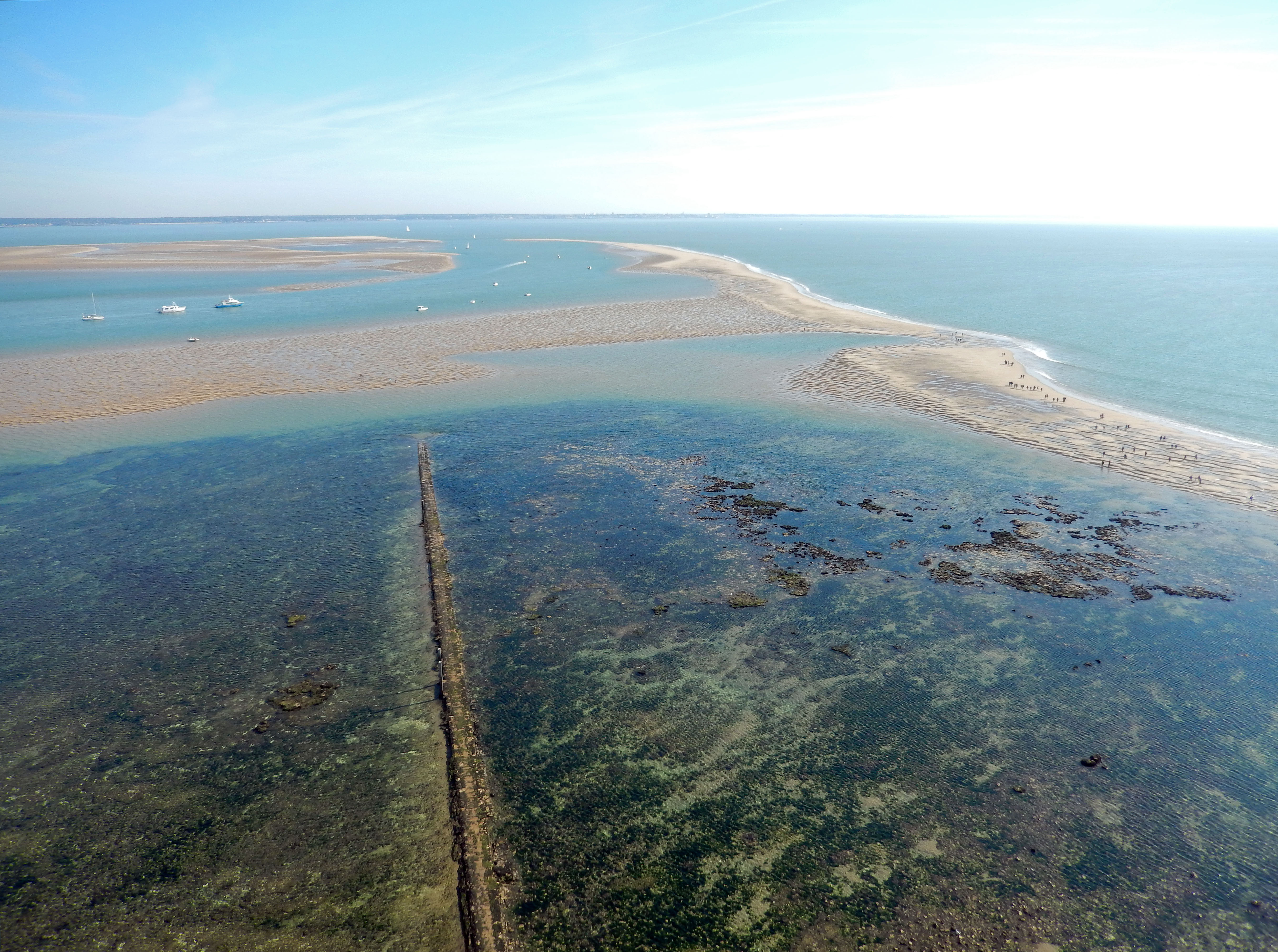 2014-09-27 Le Verdon, Gironde, phare de Cordouan